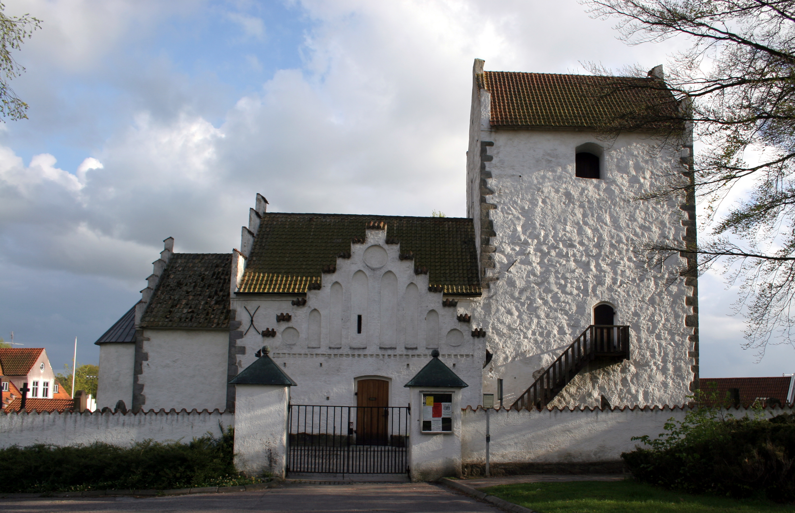 Kävlinge gamla kyrka. The old church of Kävlinge, Scania, Sweden